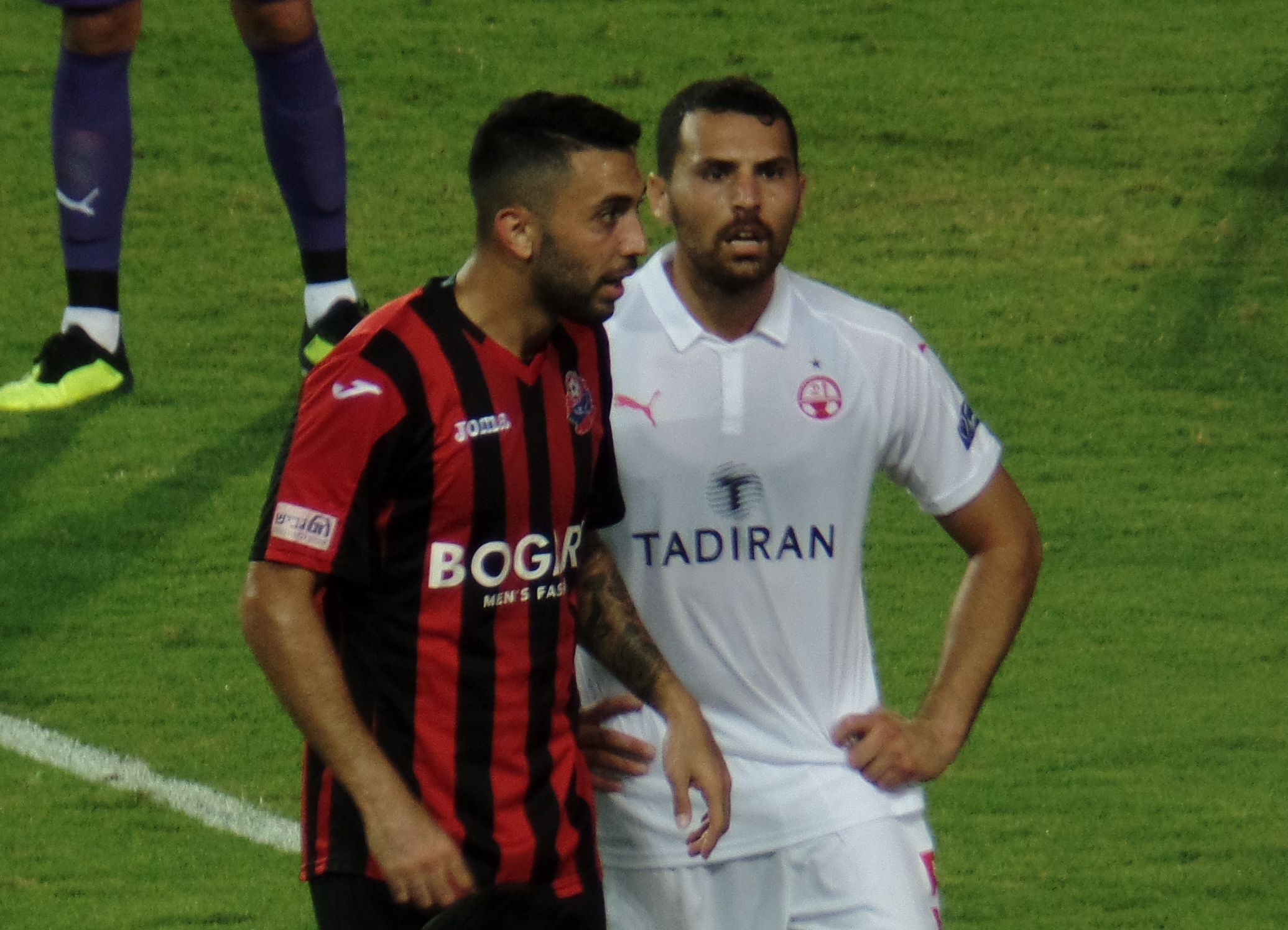 שיר צדק במדי הפועל באר-שבע, 2018